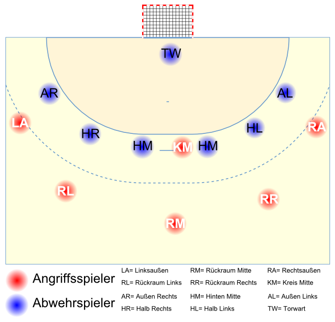 Darstellung einer 6:0-Deckung im Handball. Positionsbezeichnungen nach Handball Handbauch ISBN 3-89417-063-8, abgeleitet von 5-1-Deckung.png